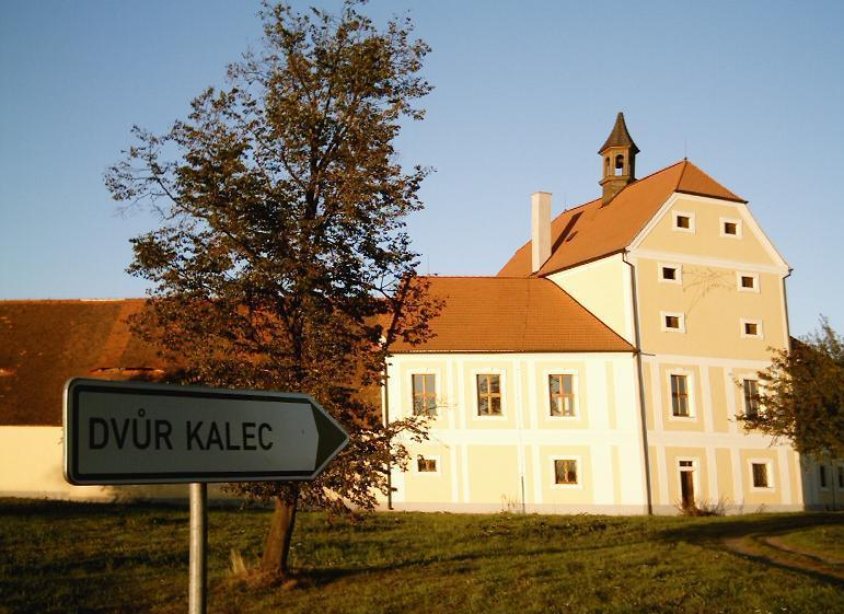 Pohled na zameček od zahrady, vlastni fotografie ktere jsem nechal na na jmeno Leo Brcek tam ukaze ze jsem to udelal.